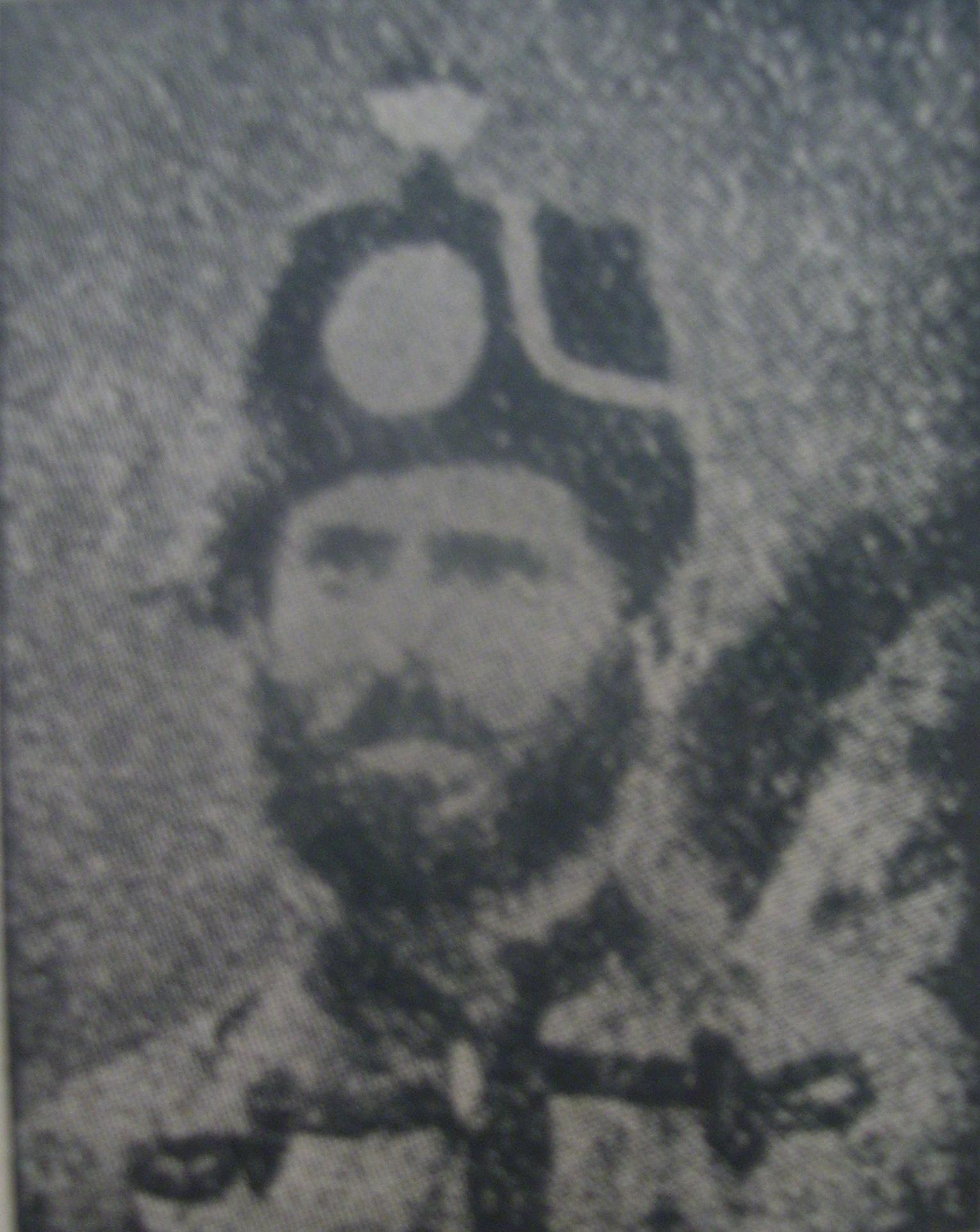 Революционерът Яким Търчилежов.